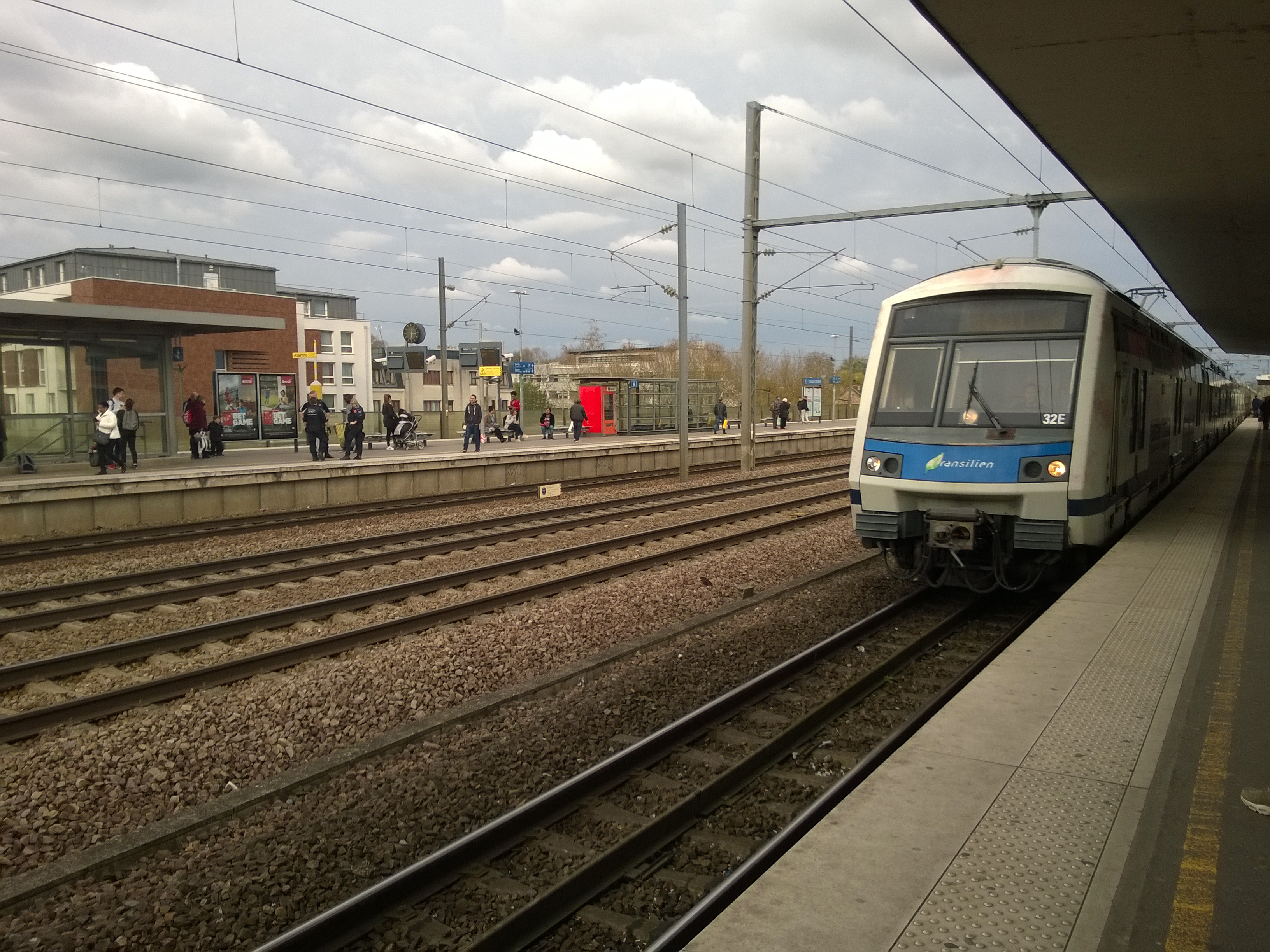 Une Z 22500 sur le quai habituellement réservé aux trains de la ligne P en gare de Chelles, département de Seine-et-Marne, France.